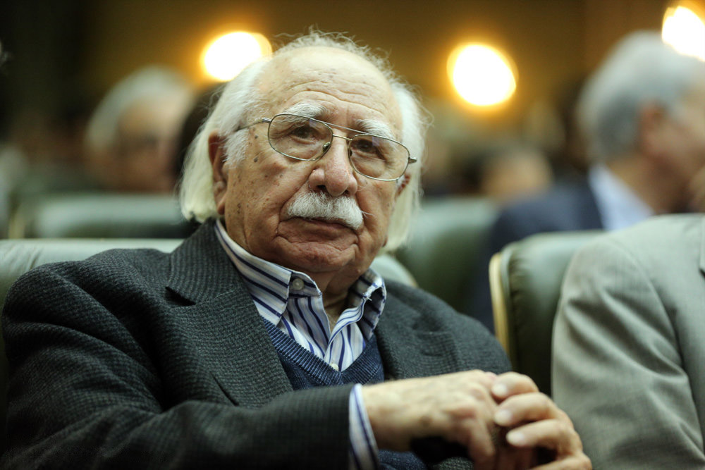 فتح‌الله مجتبایی در مراسم بزرگداشت داریوش شایگان